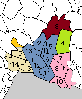 群馬県佐波郡